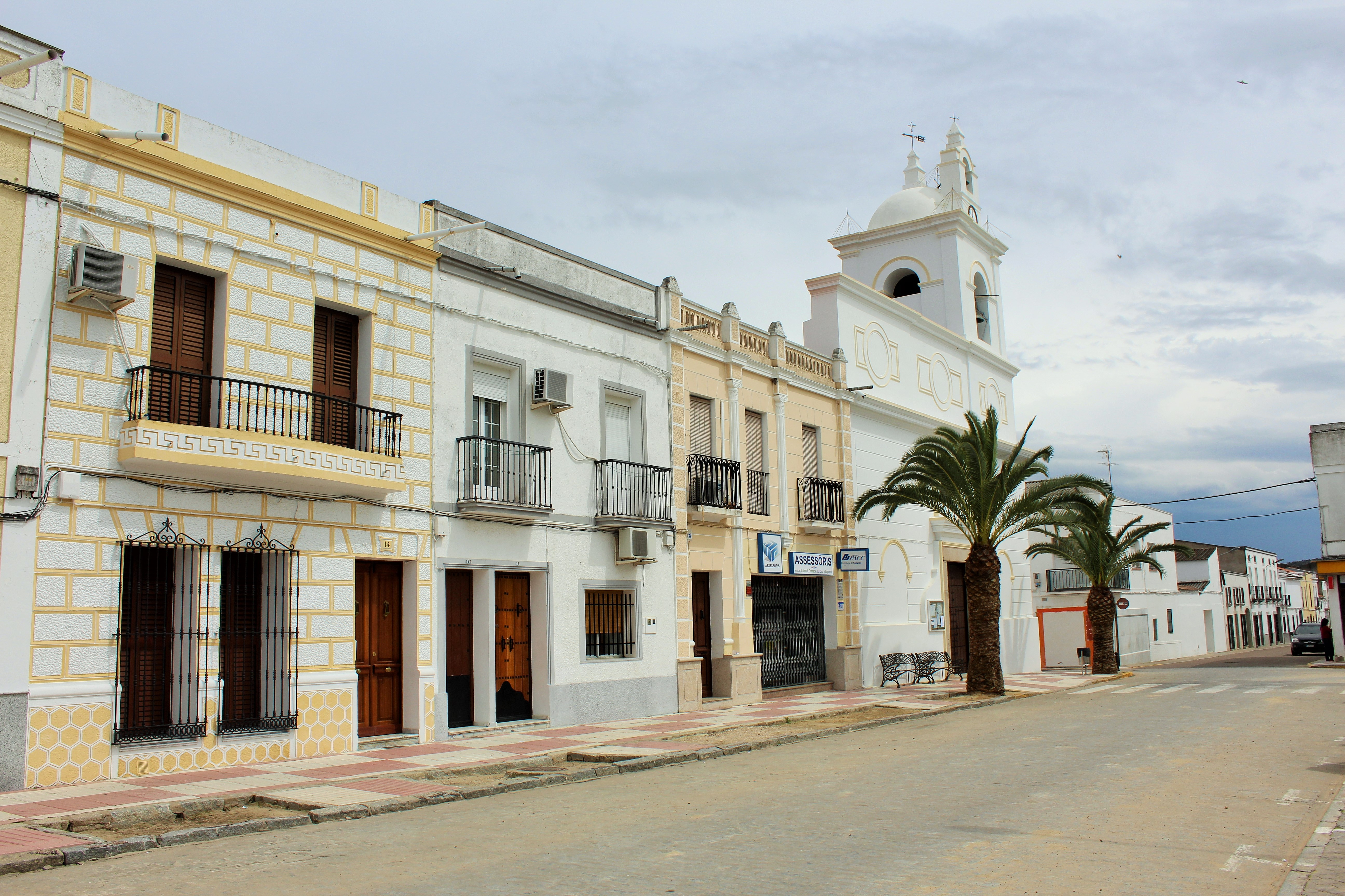 Parque y parroquia